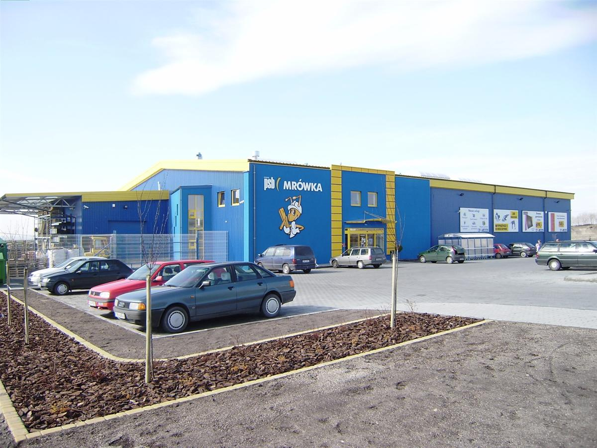 Sklep PSB Mrówka w Busku-Zdroju, zlokalizowany niedaleko siedziby Centrali Grupy PSB w Wełeczu (wylotówka na Pińczów)